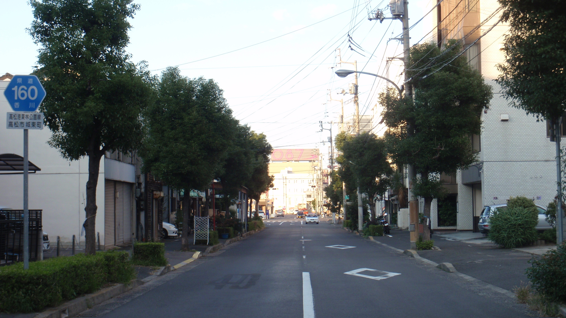 香川県道160号高松港栗林公園線。高松市城東町一丁目から北方向（起点方面）を見る。奥に見えるのは二丁目の風俗店街。